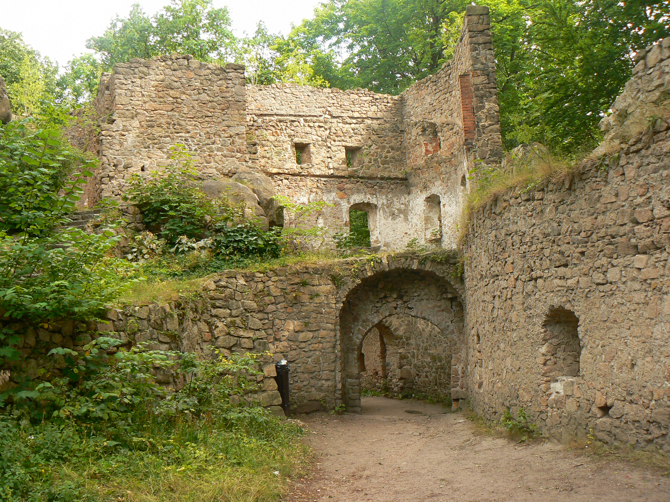 Zamek Bolczów, wieża bramna.